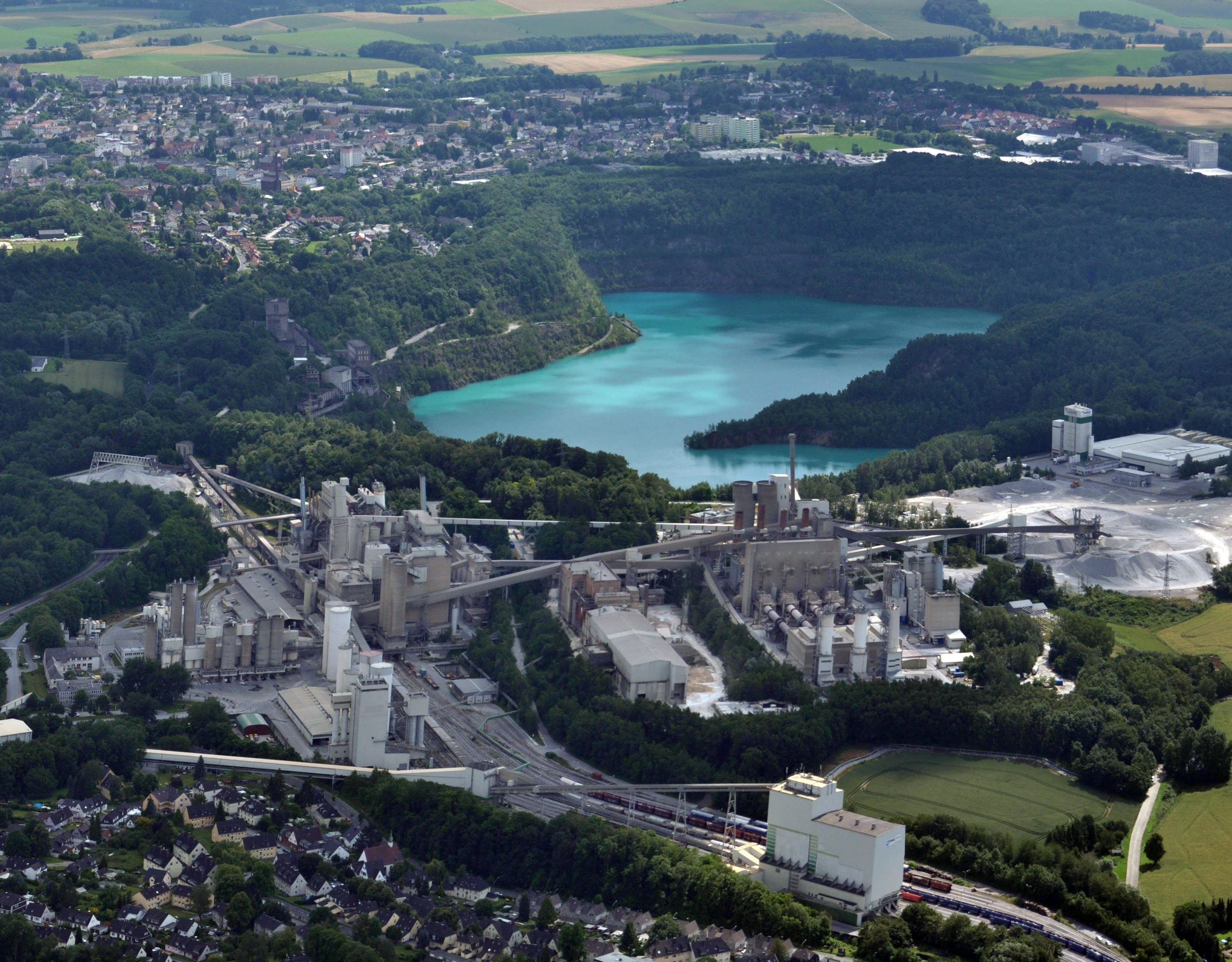 Kalkwerk in Wülfrath-Flandersbach. Dahinter die wassergefüllte Grube Prangenhaus; im Hintergrund Wülfrath Aufnahme von Westen; Luftbild aus ca. 600m Höhe über Grund